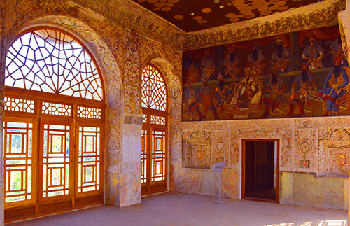 بنای دوره قاجاریه/ کاخ سلیمانیه